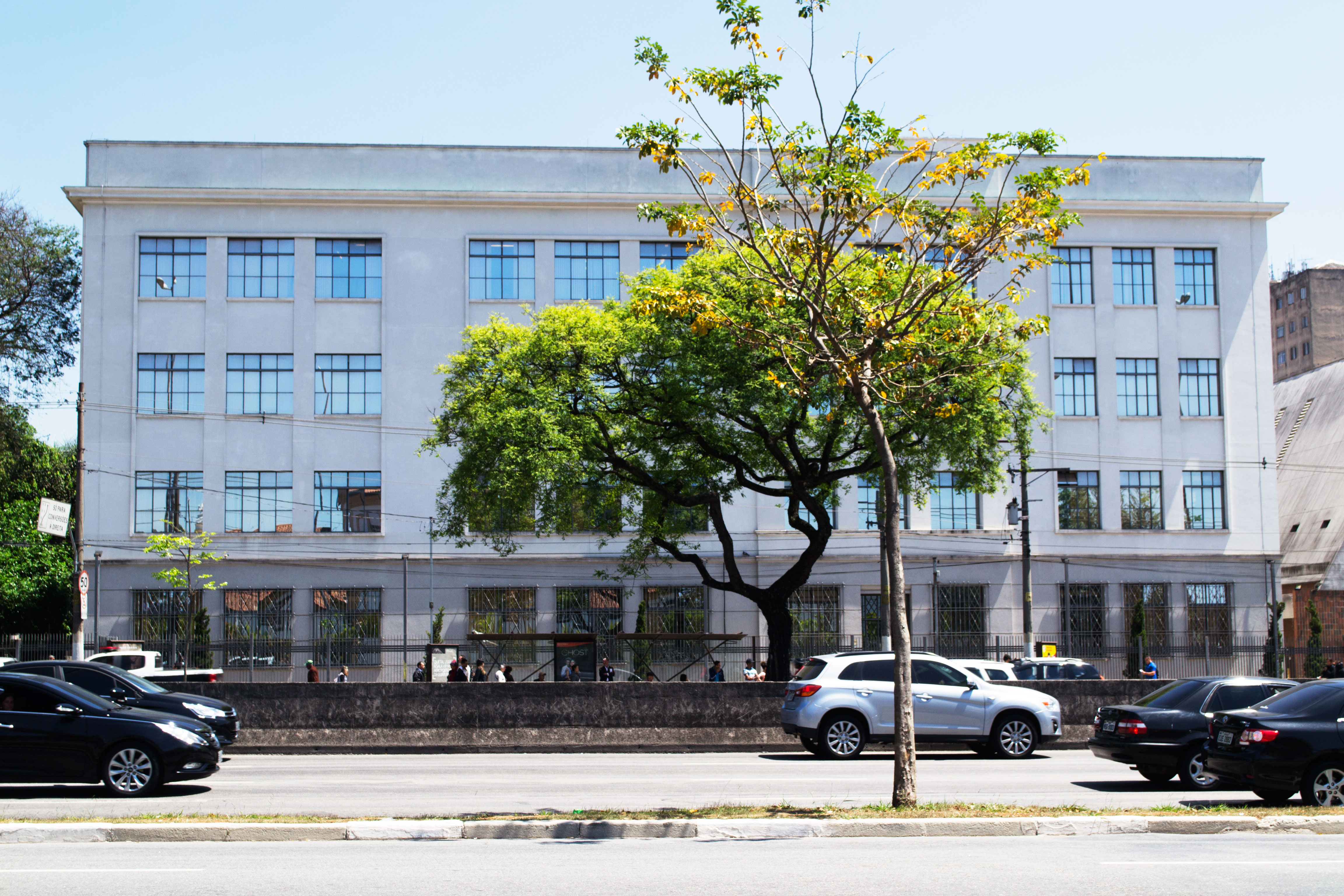 A antiga Escola Politécnica vista frontalmente da Avenida Tiradentes, atual Faculdade de Tecnologia do Estado de São Paulo, em São Paulo (SP), Brasil